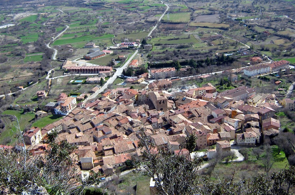 Vista de Poza de la Sal desde el castillo.